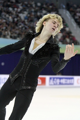 Артур Гачинский на Кубке Китая 2011.